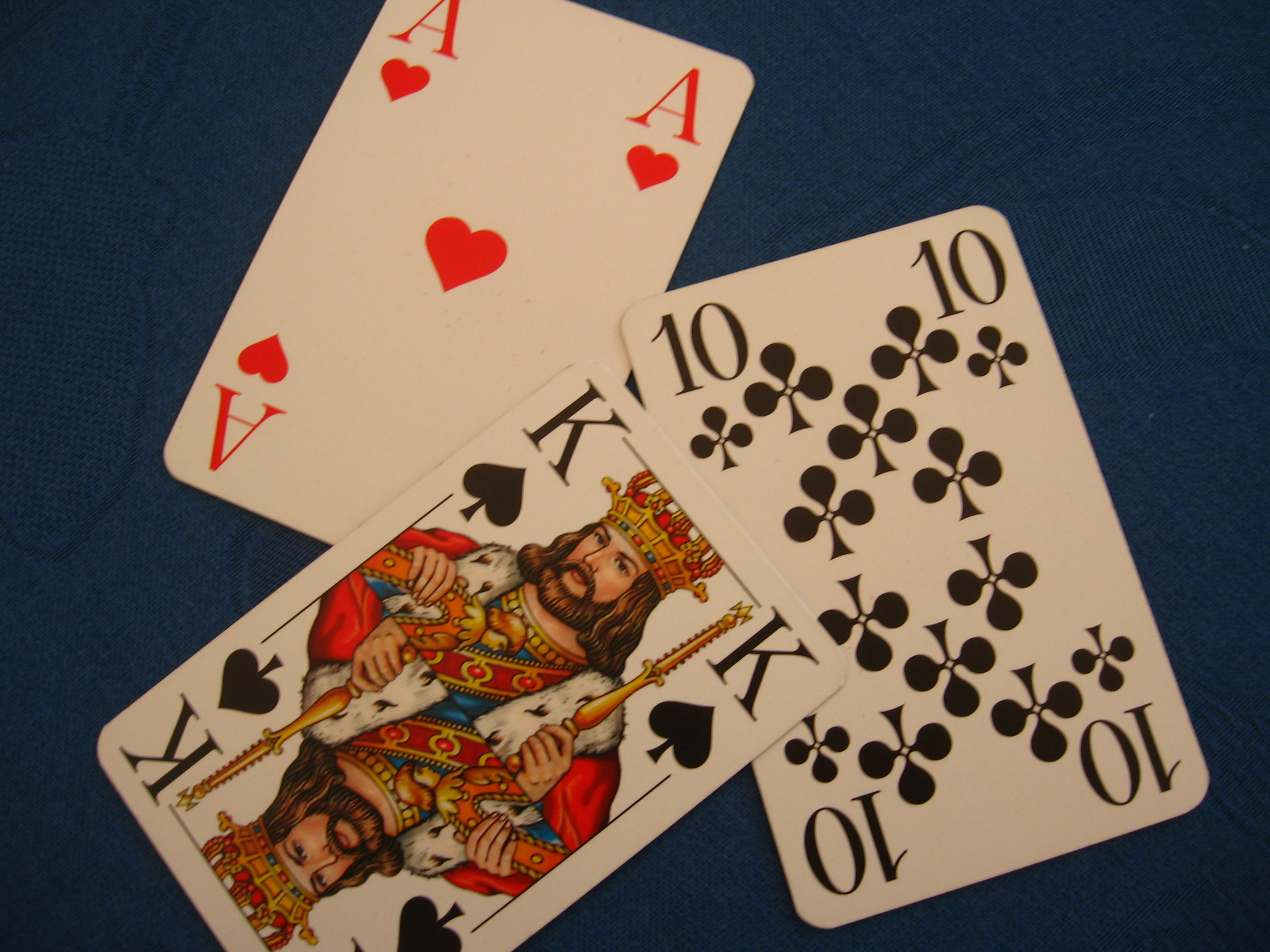 Stich beim Skat